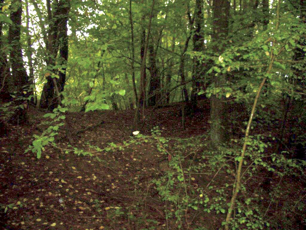 Mittelalterliche Schachtpinge bei Steinbach